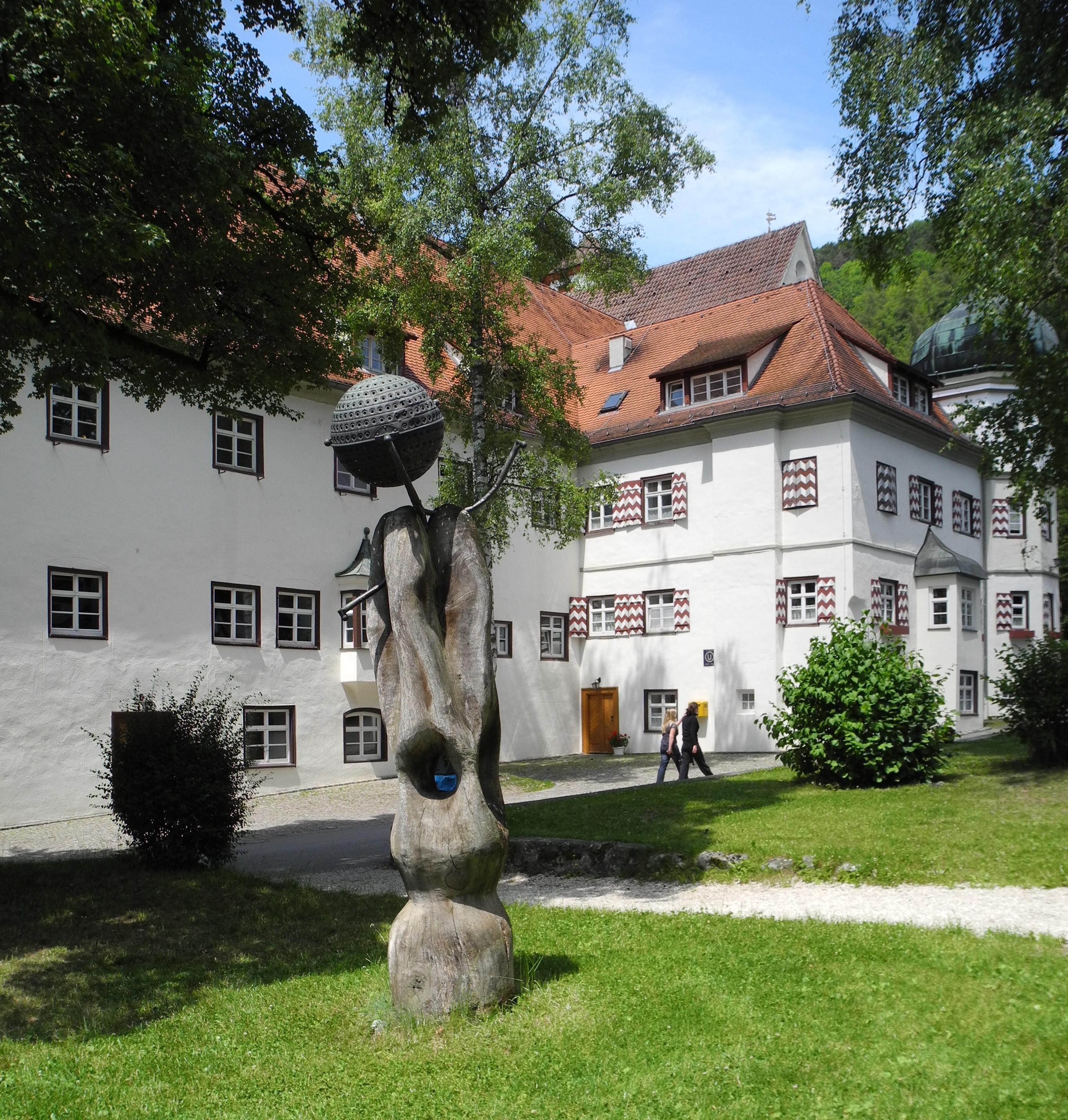 Schelklingen - Ehemal. Kloster Urspring, Internat02